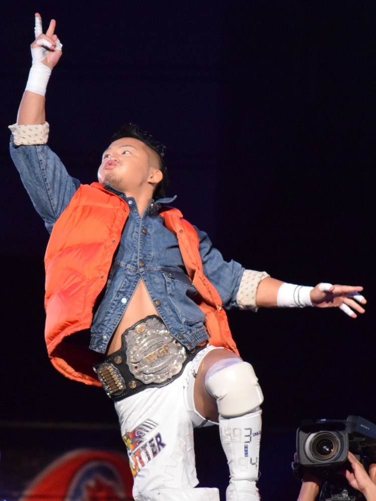 2015年8月1日 大阪府立体育会館 「G1 CLIMAX 25」 KUSHIDA